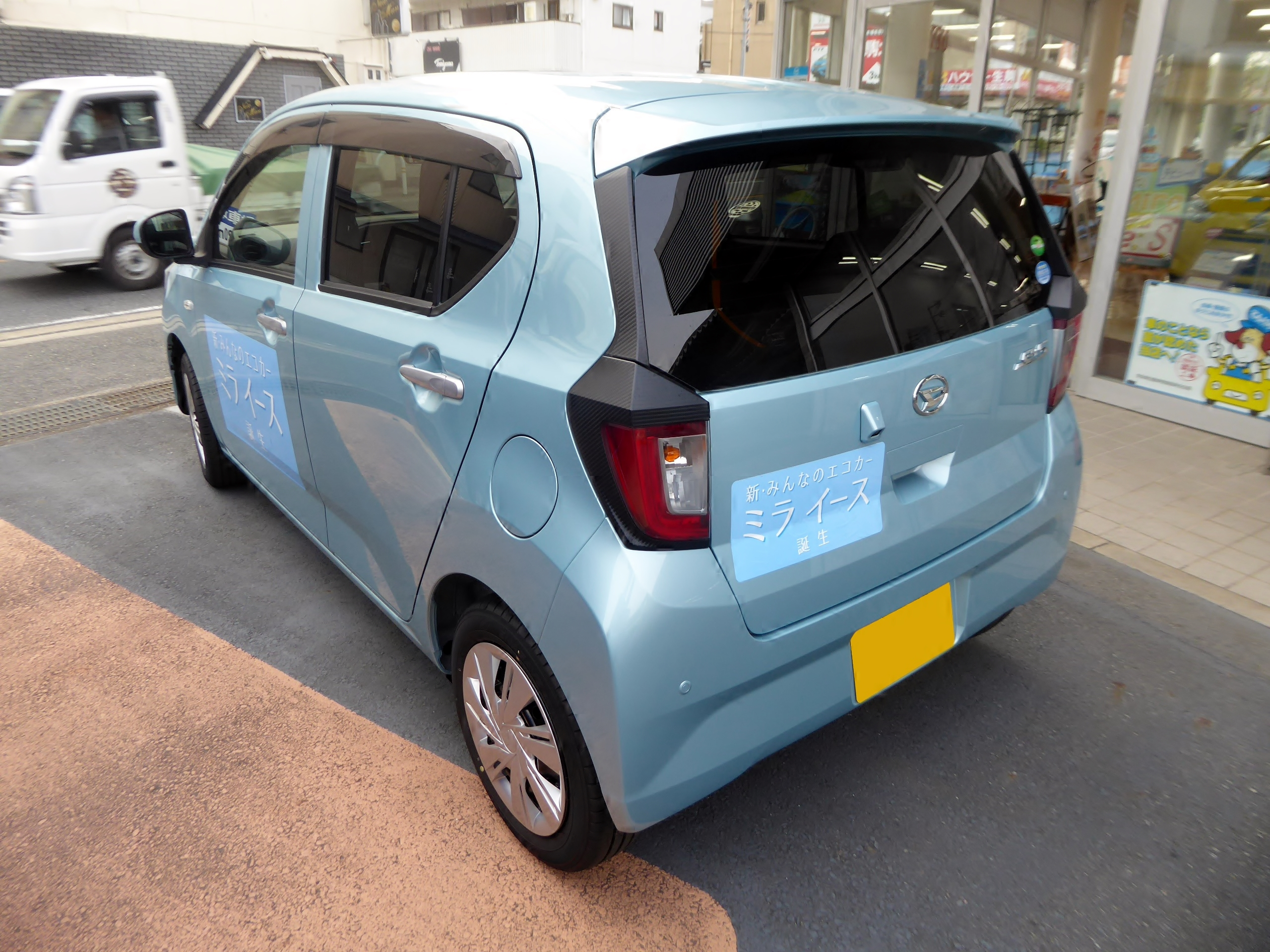 DBA-LA350S型ダイハツ・ミライースX"SA III"をリアから撮影。